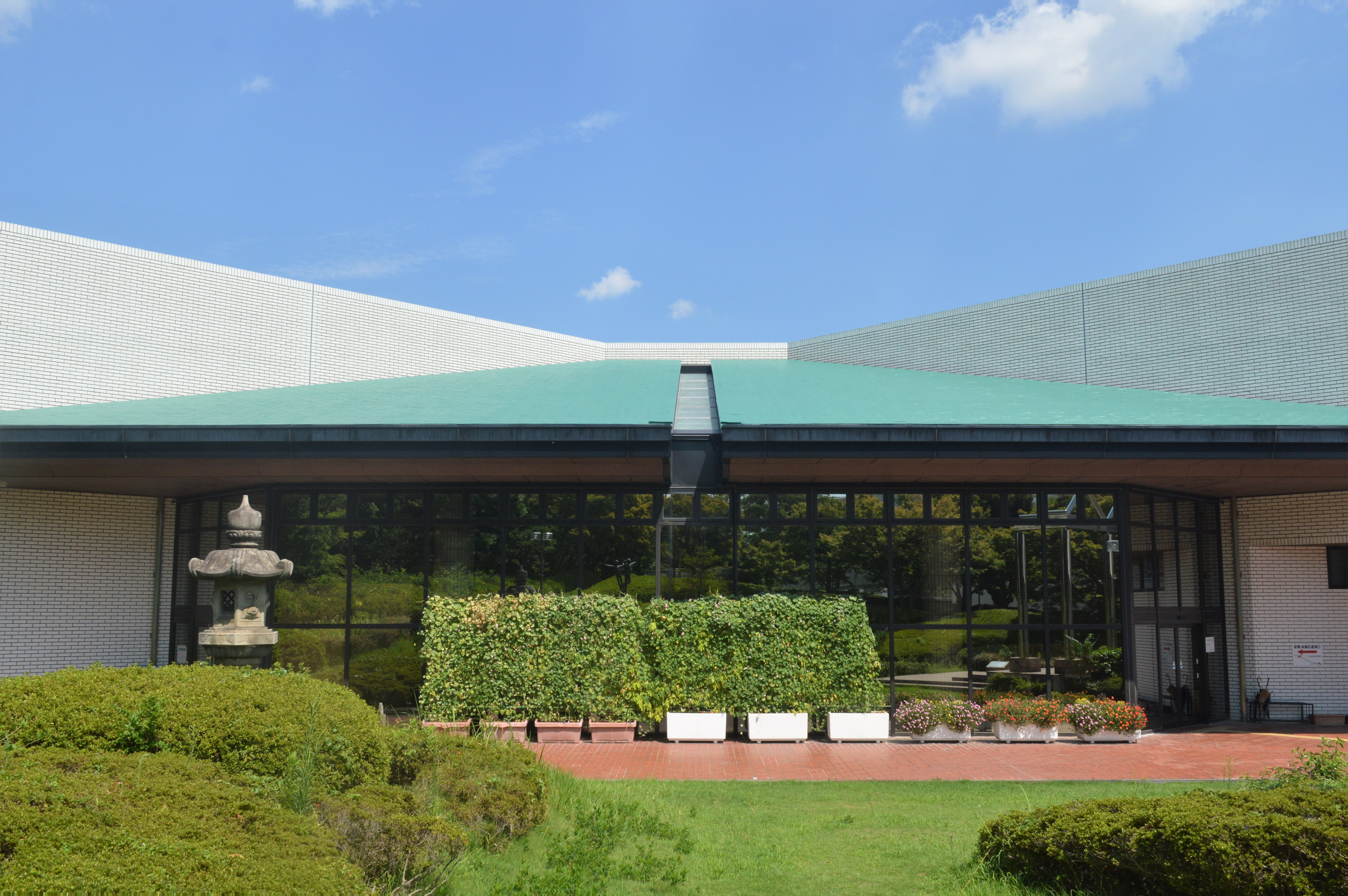 愛知県大府市の大倉会館。大府市歴史民俗資料館が入っている本棟。